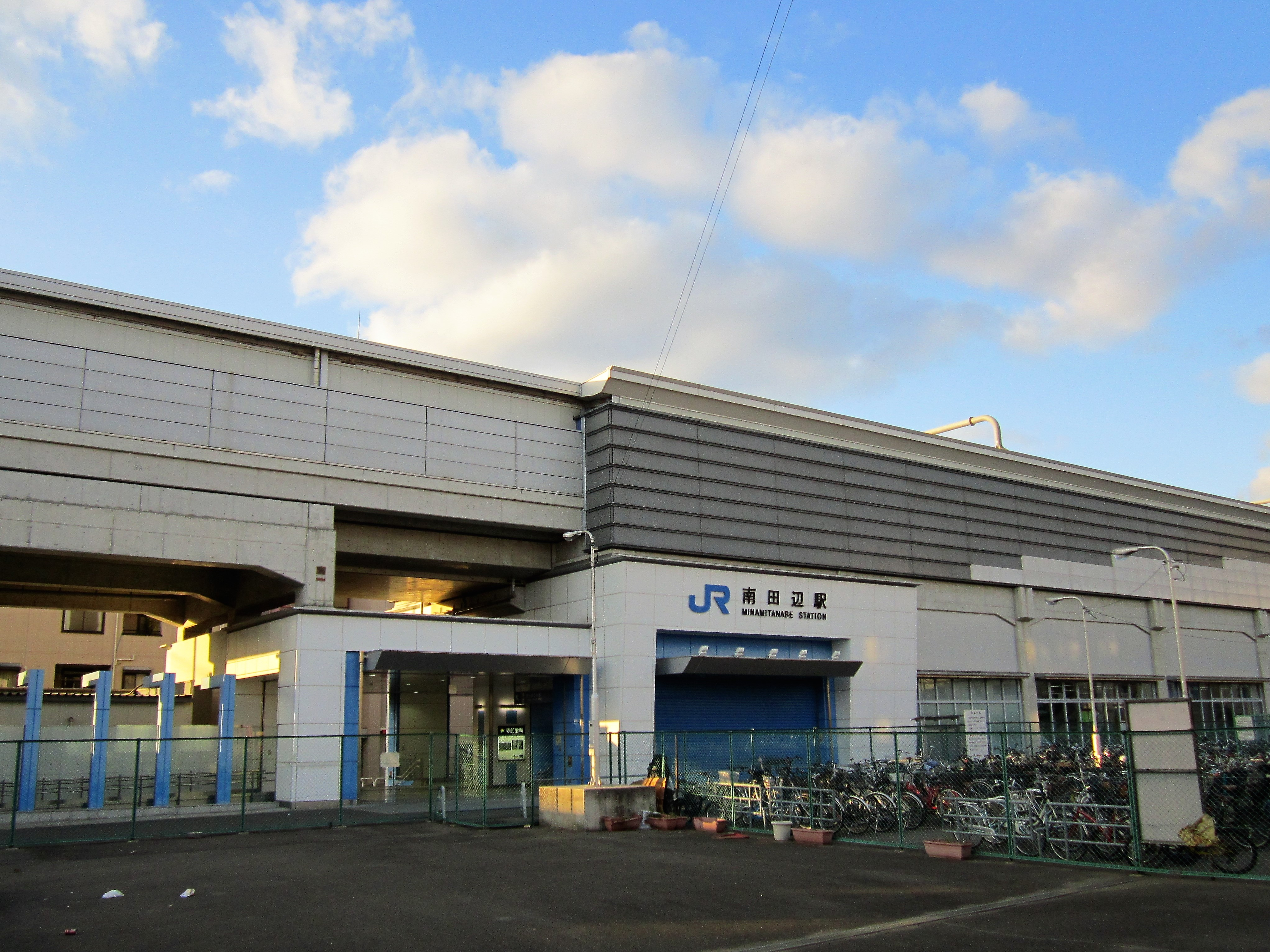 南田辺駅東口 Canon PowerShot A2200